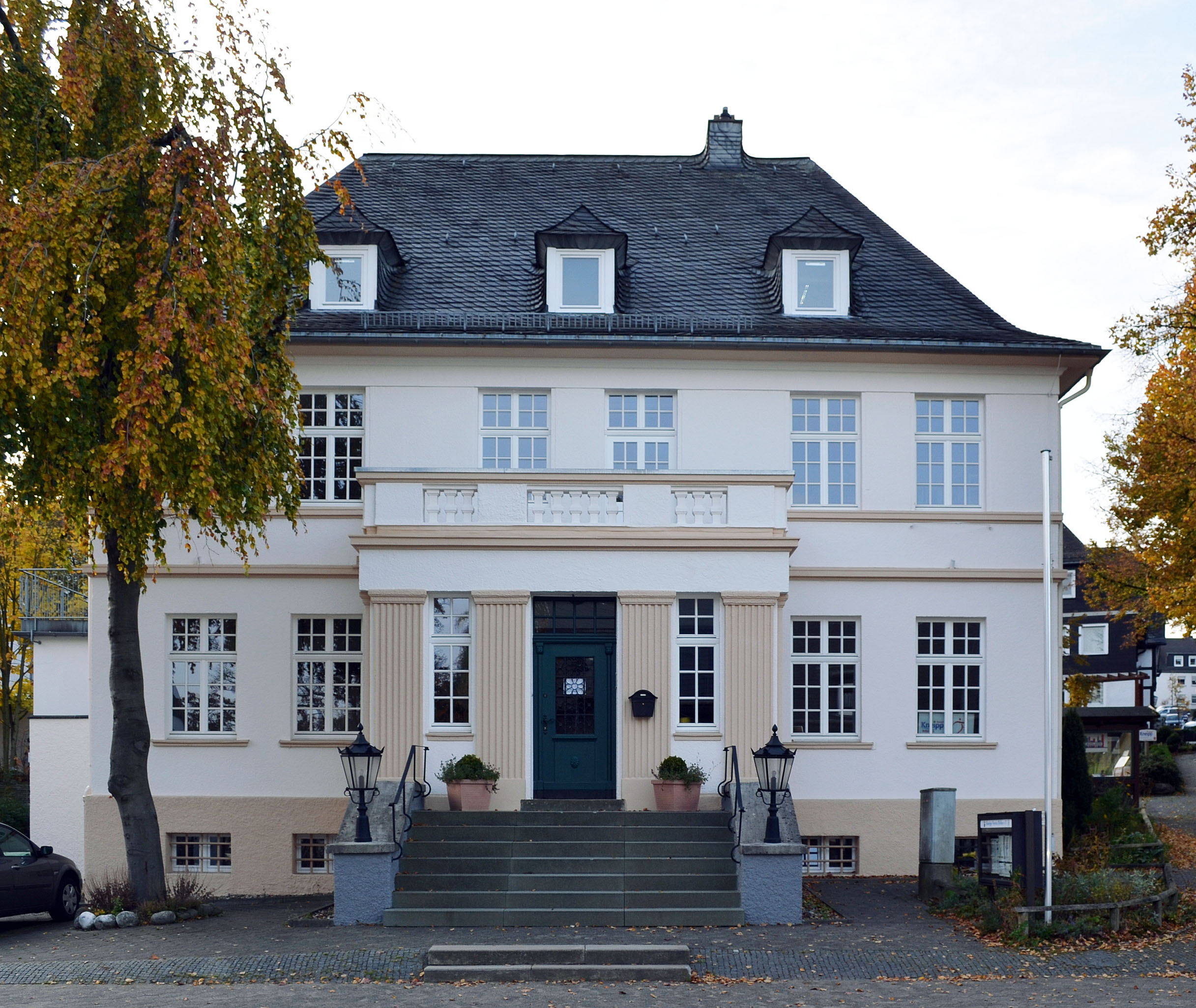 Brilon Gartenstraße 13 This image shows a heritage building in Germany, located in the North Rhine-Westphalian city Brilon.